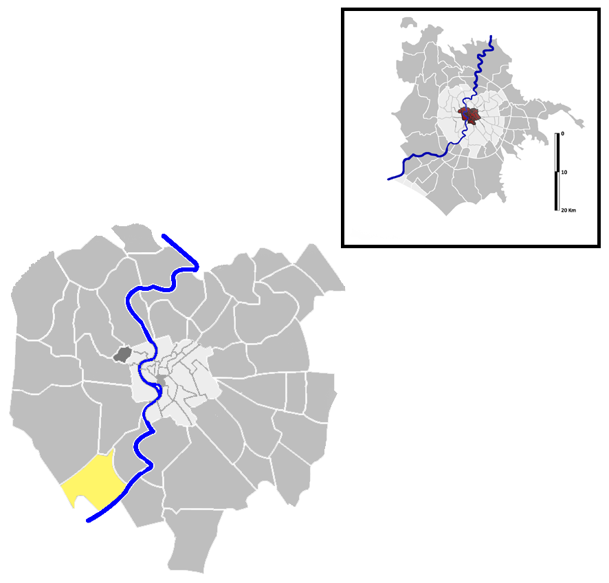 Portuense